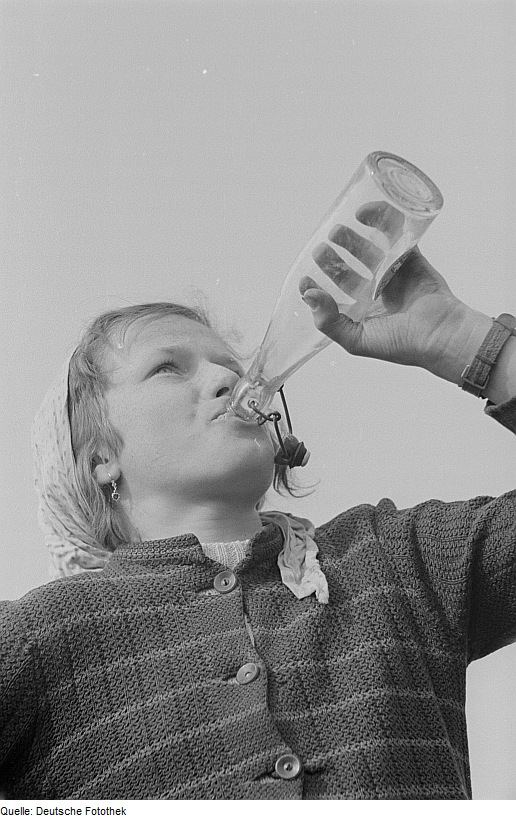 Original image description from the Deutsche Fotothek Aufbauhelferin